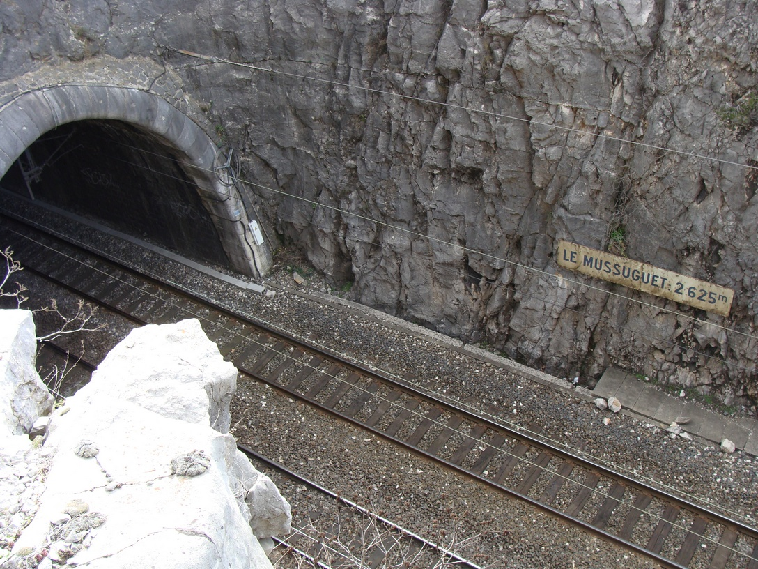 A l'entrée nord du tunnel du Mussuguet, panneau portant mention de la longueur du tunnel.